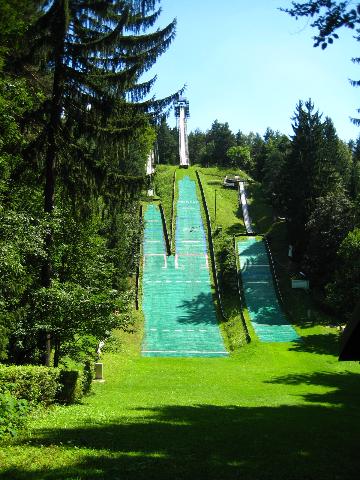 Ski jumps in Mostec, Ljubljana.